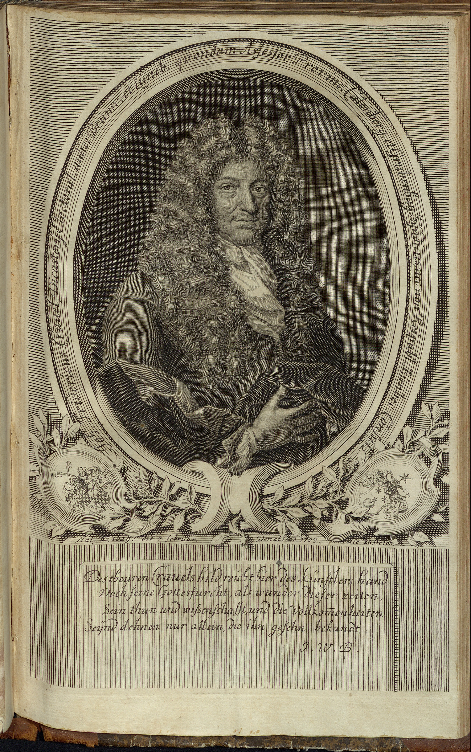 Kupfertitel für die von dem Pastor „Jakob Eberhard Leidenfrost“ verfasste und 1703 vorgetragene Leichenpredigt für den Juristen, Kurfürstlich Braunschweig-Lüneburgischen Hofgerichtsassessor und Syndikus der Fürstentümer Calenberg und Grubenhagen sowie Bürgermeister der Stadt Einbeck „Johann Friedrich Crauel“ Literatur: Peter Mortzfeld (Bearb.): Katalog der graphischen Porträts in der Herzog-August-Bibliothek Wolfenbüttel, Reihe A: Die Porträtsammlung der Herzog-August-Bibliothek Wolfenbüttel, Bd. 30: Biographische und bibliographische Beschreibungen mit Künstlerregister, 2.: Bre - Em [A 2765 - A 5598], München: Saur, 1997, ISBN 978-3-598-31510-7 und ISBN 3-598-31510-4 und ISBN 978-3-598-31480-3 und ISBN 3-598-31480-9, S. 173